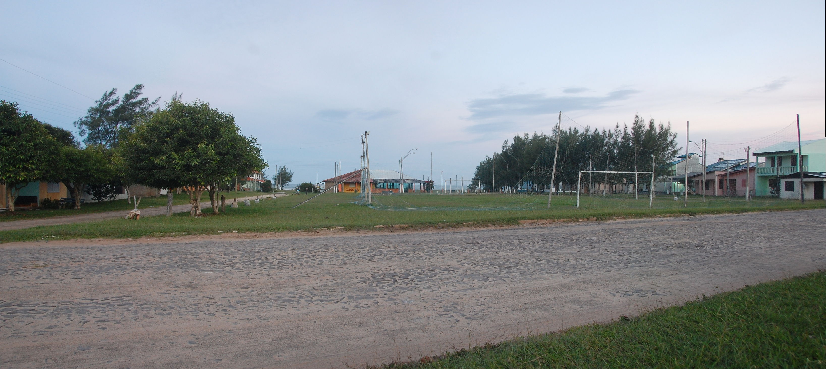 Foto da Praia Arroio Seco